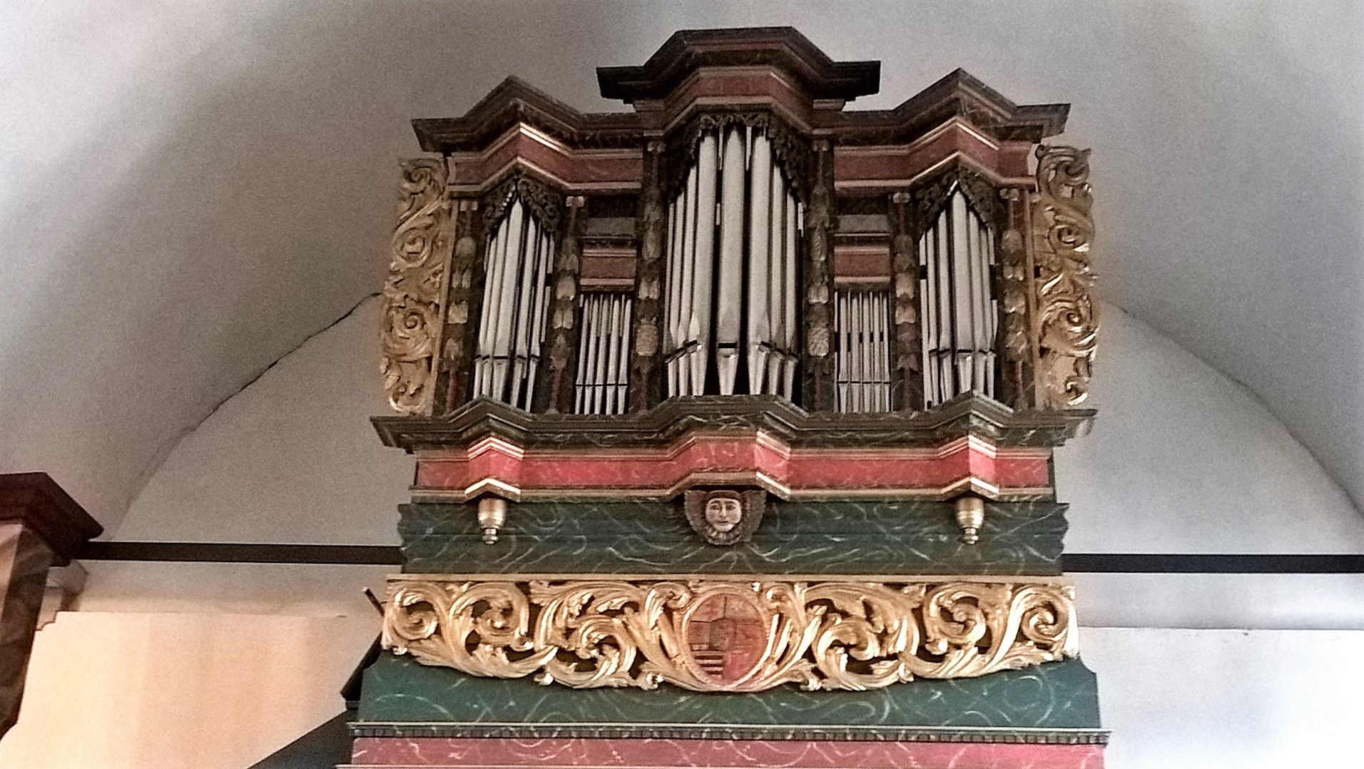 Evangelische Kirche Königsberg, Gemeinde Biebertal, Hessen, Deutschland